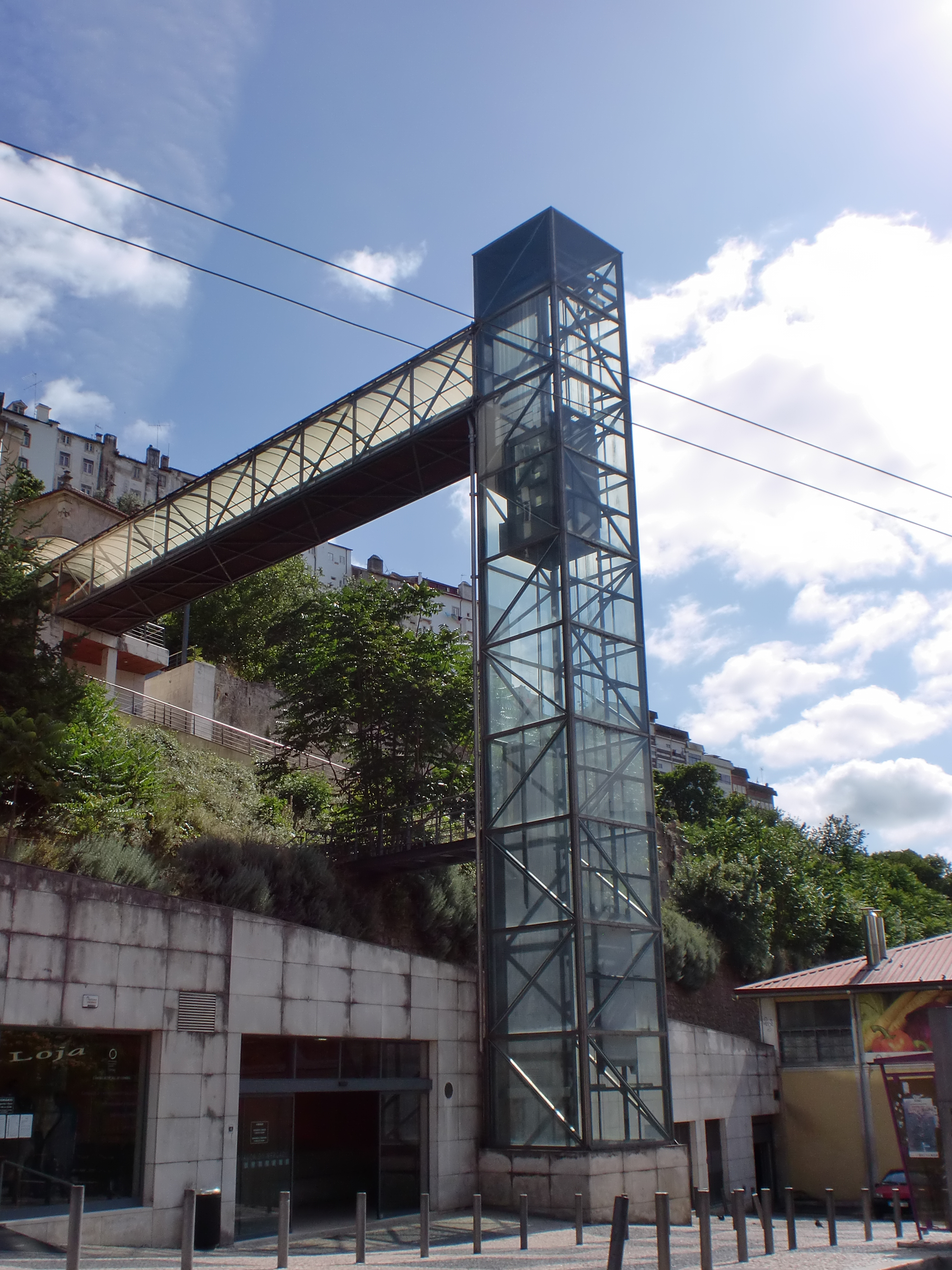 Elevador do Mercado, junto ao Mercado Municipal D. Pedro V, em Coimbra.